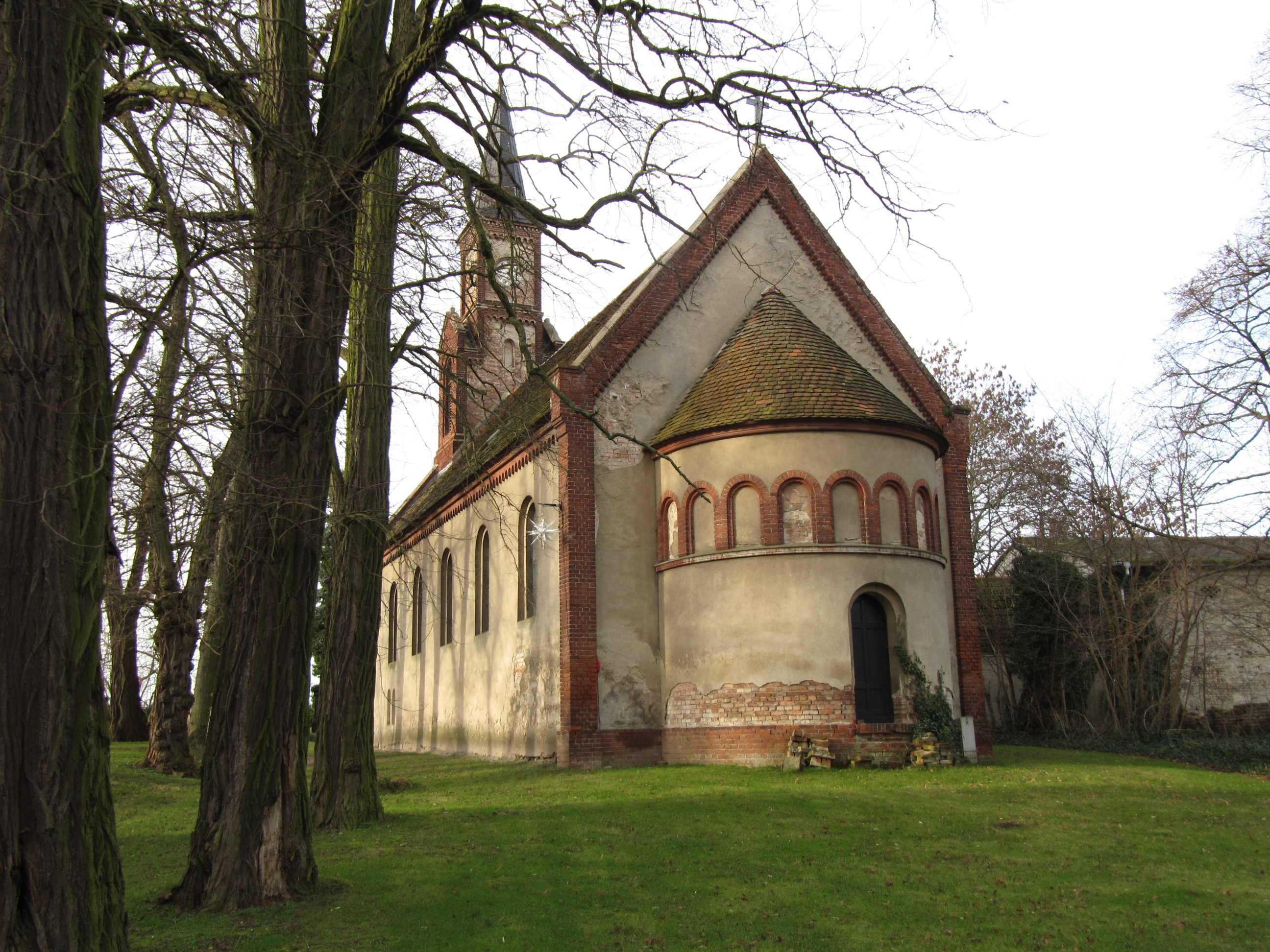 kirche butzow, beetzseeheide von osten